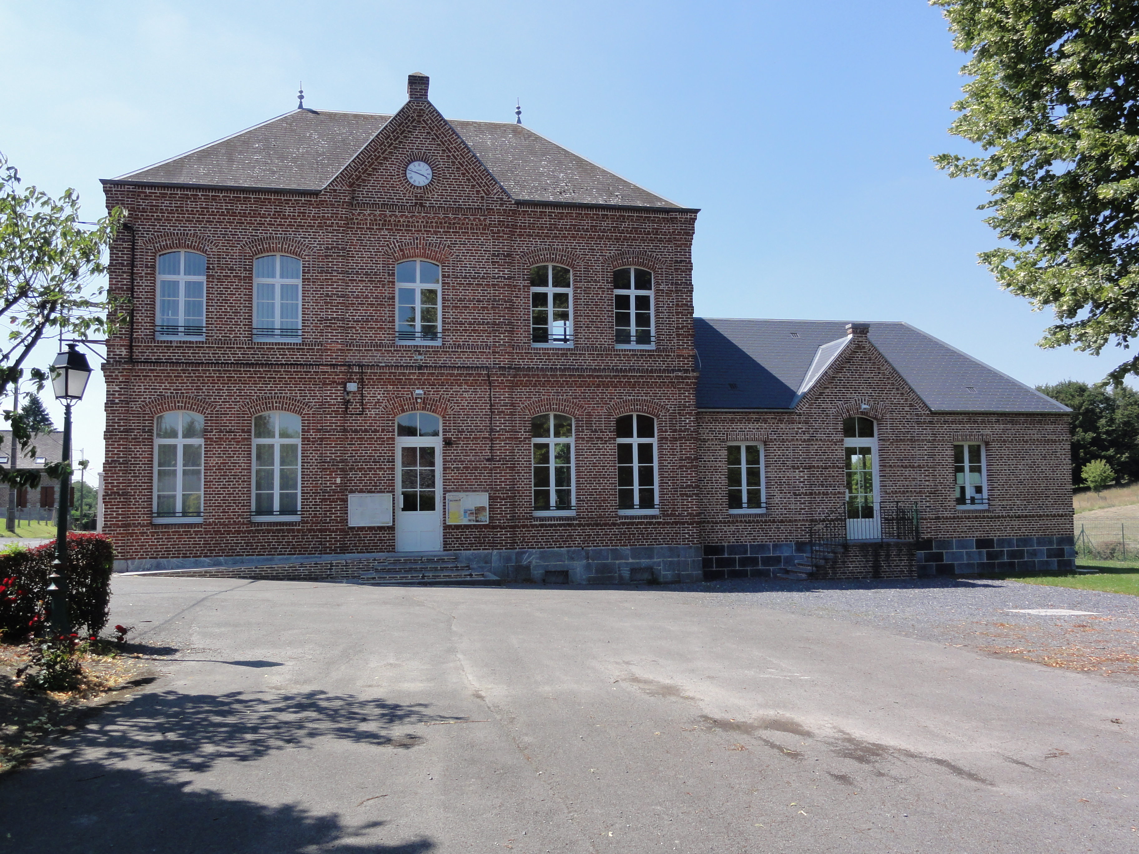 Papleux (Aisne, Fr) mairie